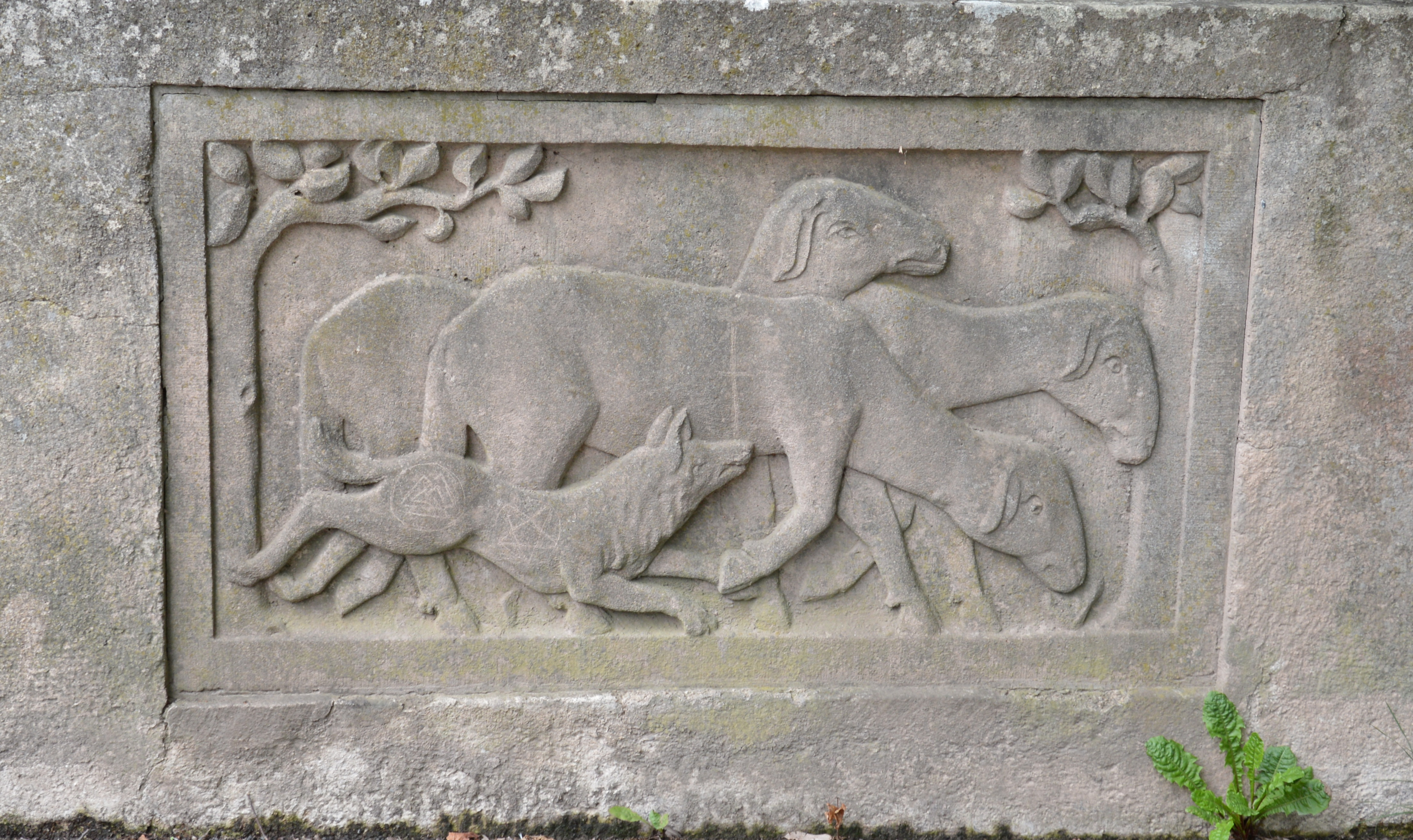 Schafe an der Schafbrücke